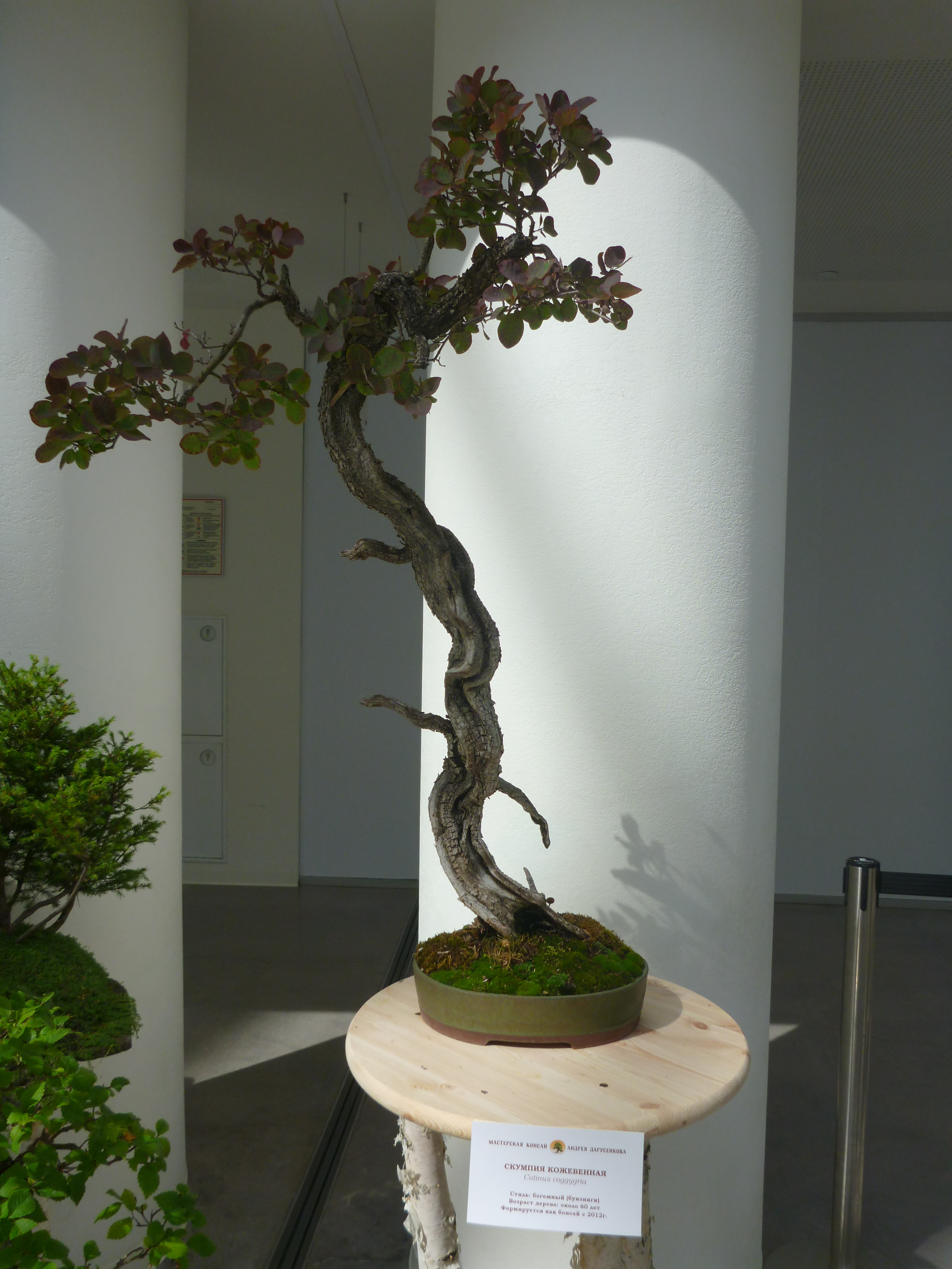 Скумпия кожевенная бонсай в Ельцин-центре 2019 год